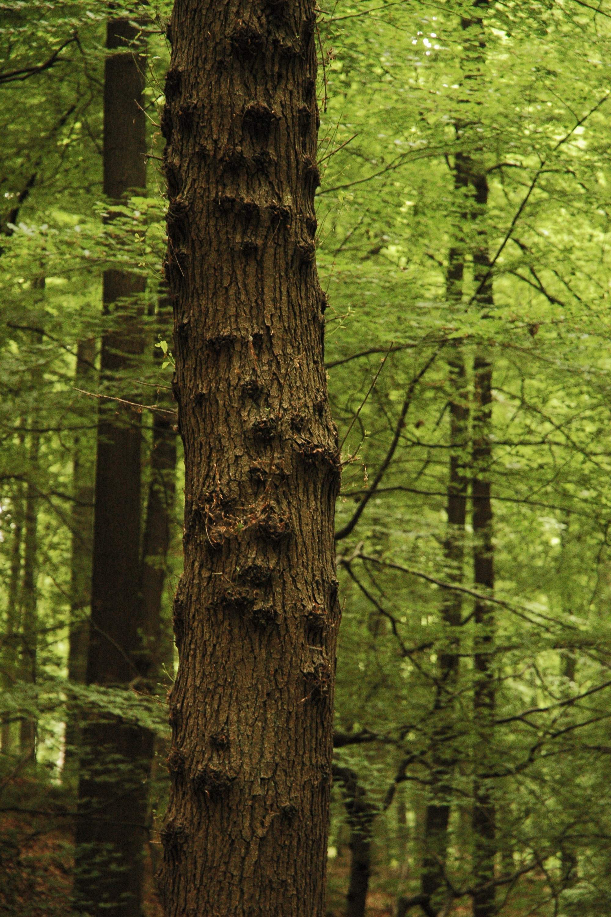 Tronc d'arbre dans la forêt de Soignes à BruxellesTree in the Soignes forest in Brussels